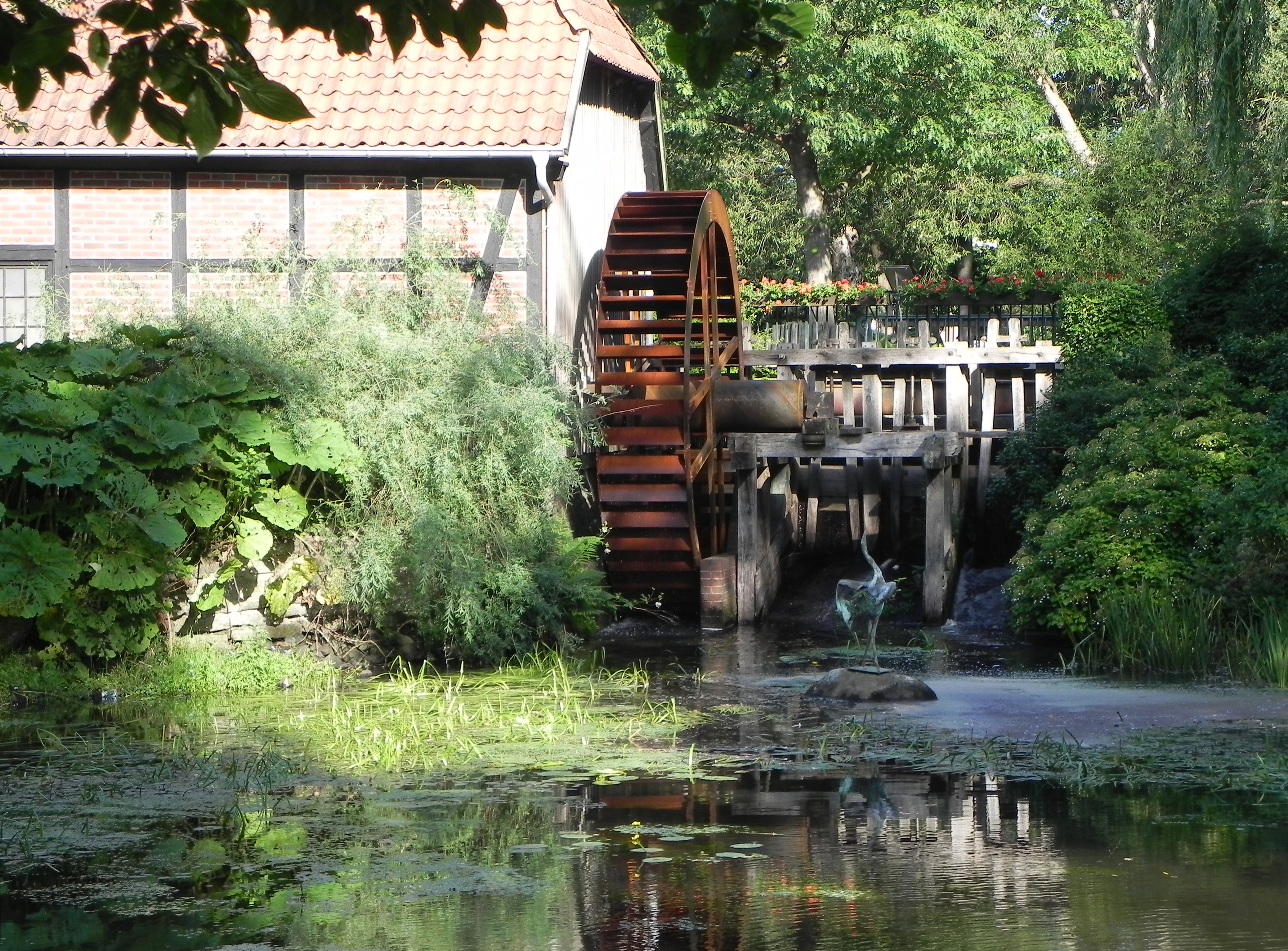 Wassermühle ursprünglich aus dem 17. Jahrhundert, in Munster (Örtze), Niedersachsen, Germany